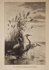 Per los estanys - quadro de Joseph M. Marquès